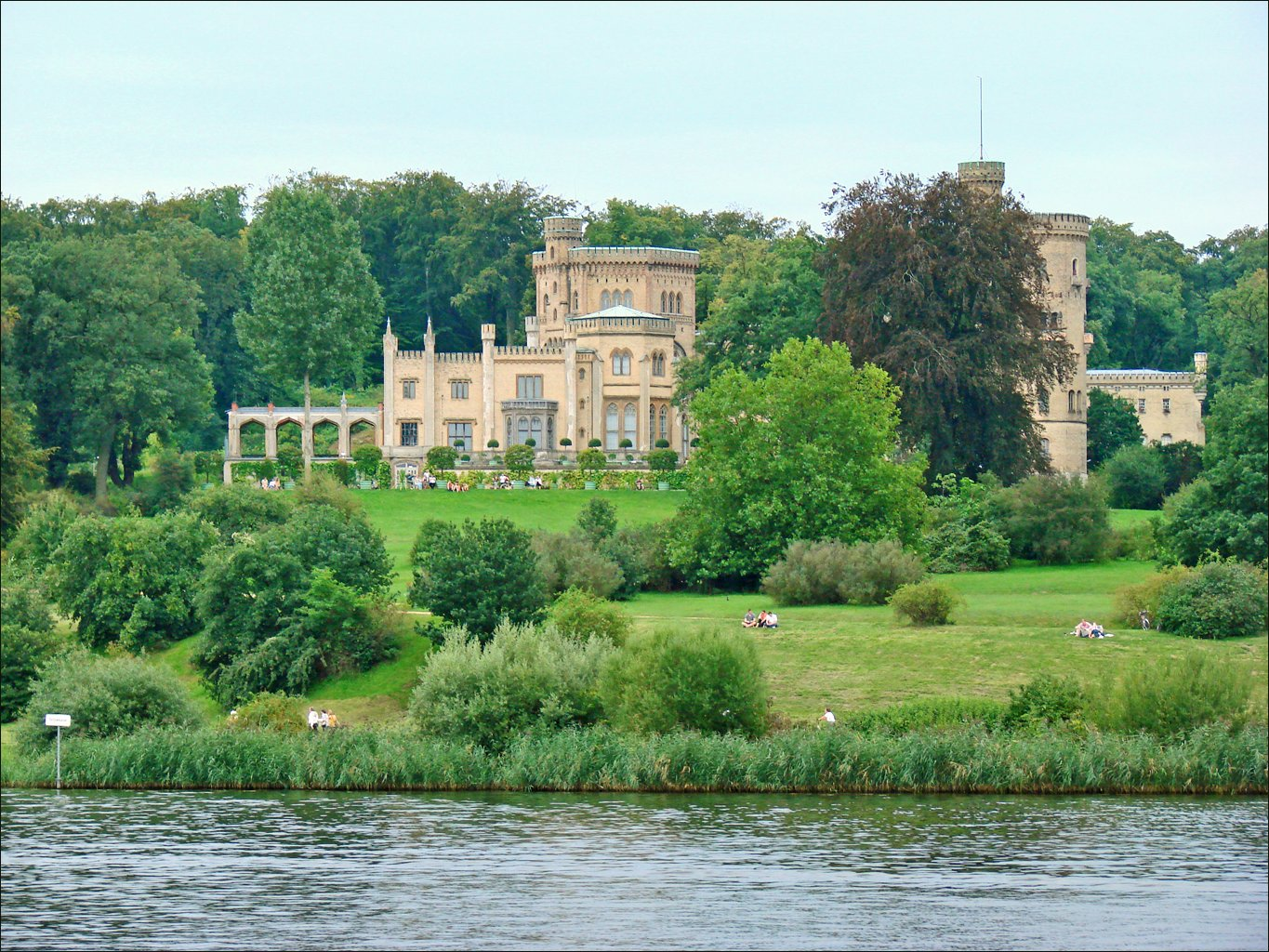 Le Prince Guillaume, futur empereur d'Allemagne Guillaume Ier, était marié à Augusta de Saxe-Weimar qui a voulu la construction d'une résidence dans le style néogothique anglais sur la colline de Babelsberg. Le château de Babelsberg, dont les travaux de construction commencèrent en 1833, fut leur résidence d’été. Karl Friedrich Schinkel est l’architecte à l’origine de cet édifice néo-gothique. Après la mort de ce dernier, en 1841, Ludwig Persius poursuivit le projet. Les salons de style néo-gothique de l’impératrice Augusta et de l’empereur Guillaume 1er sont accessibles au public. Les jardins anglais du château furent aménagés par Peter Joseph Lenné et par le prince Pückler. extrait du site voir aussi une photo du château prise en 2008